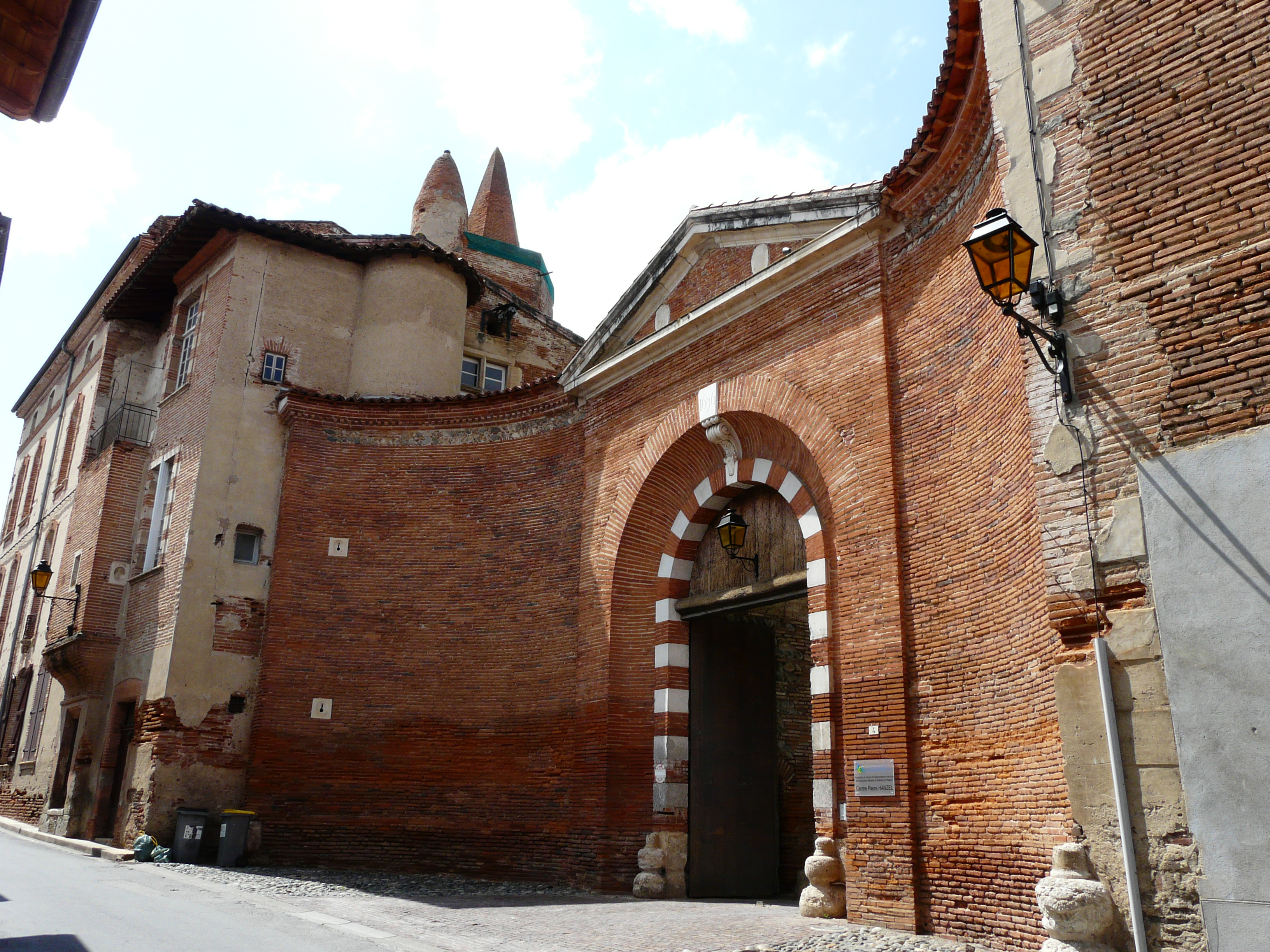 Portail d'accès à la maison Laguens, Rieux-Volvestre, Haute-Garonne, France.